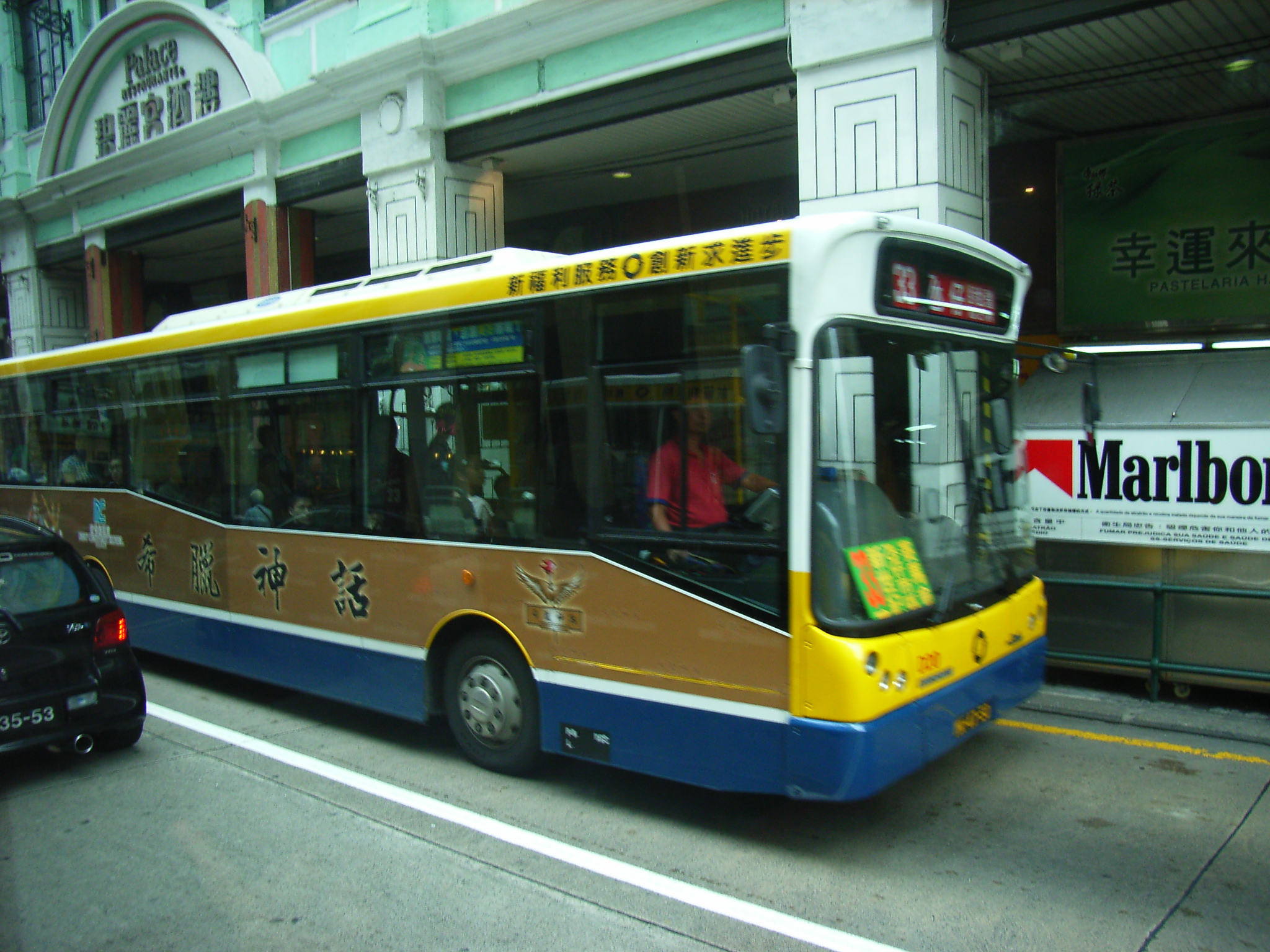 Macau vehicles 澳門的陸上交通工具 澳門新福利公共汽車, Transmac bus.